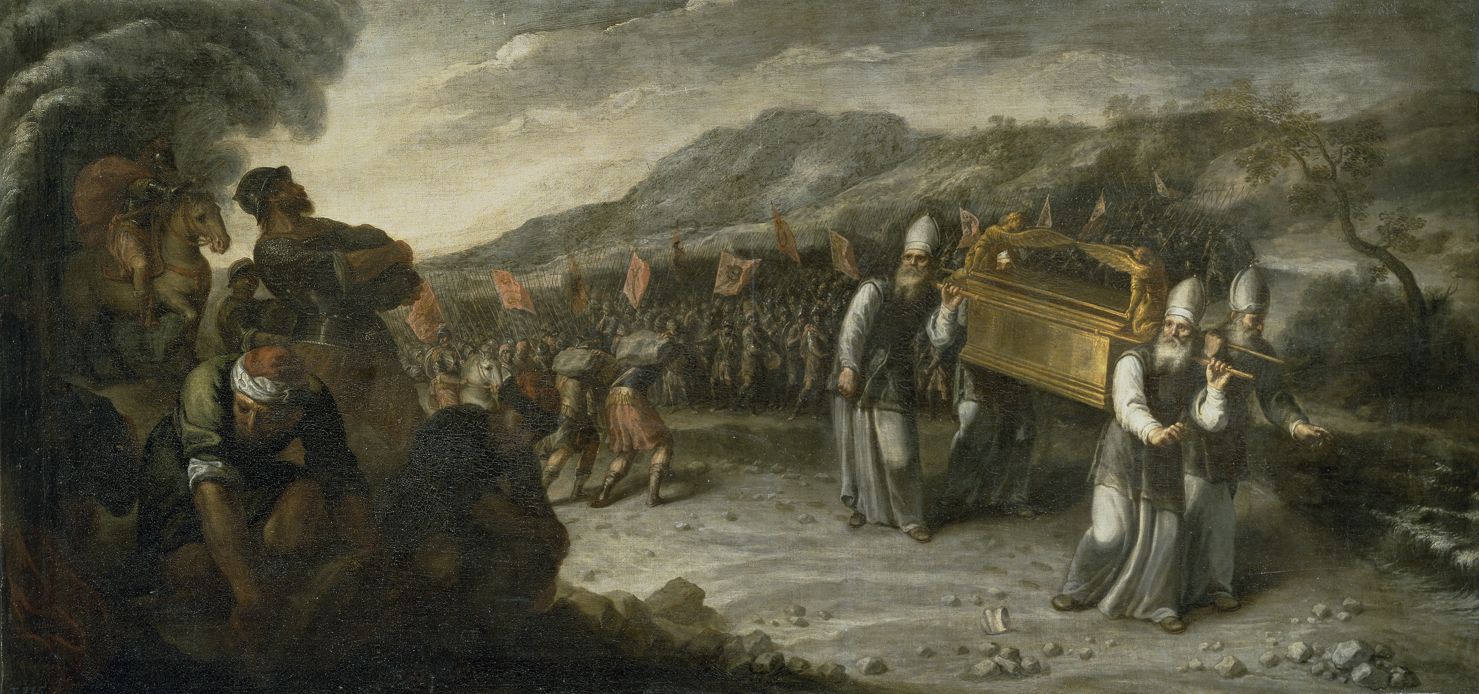 La obra representa a los israelistas portando el Arca de la Alianza y cruzando el río Jordán.